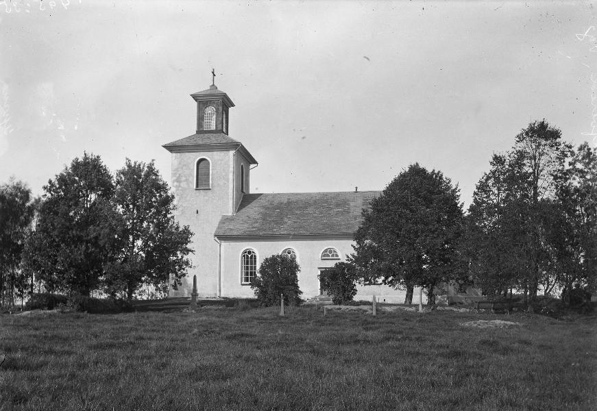 Kyrkan från söder.